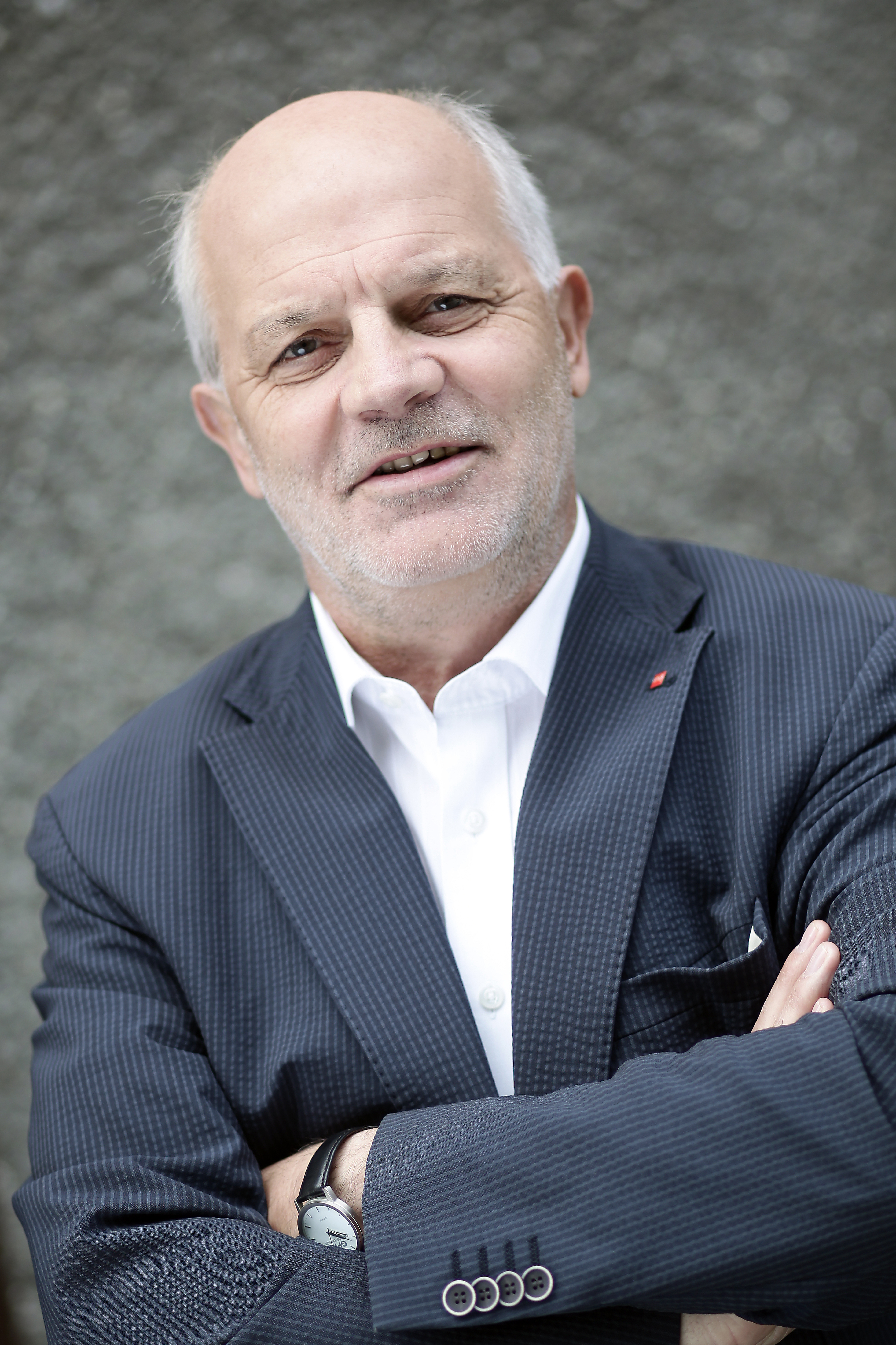 Johann Affenzeller, sp-klub